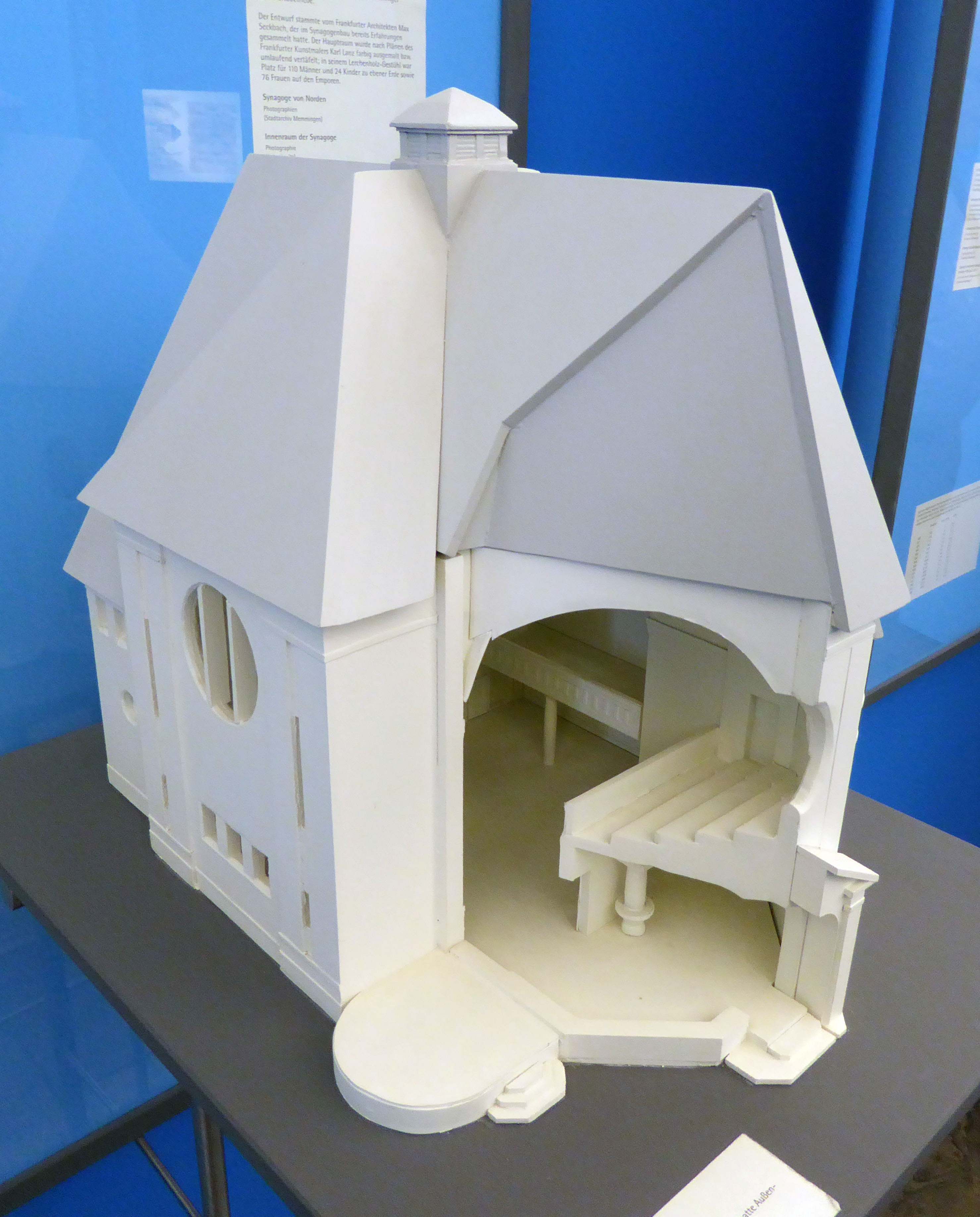 Modell der Synagoge Memmingen, ausgestellt im Stadtmuseum im Hermansbau (Veröffentlicht mit freundlicher Genehmigung des Stadtmuseums)